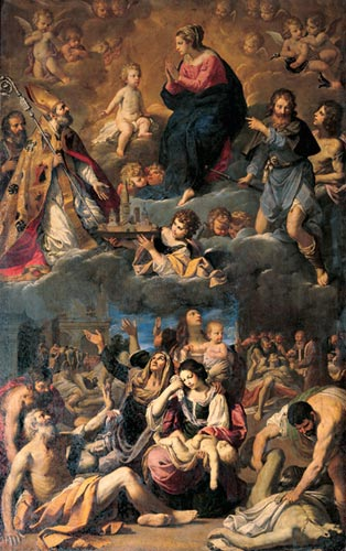 Pala della peste